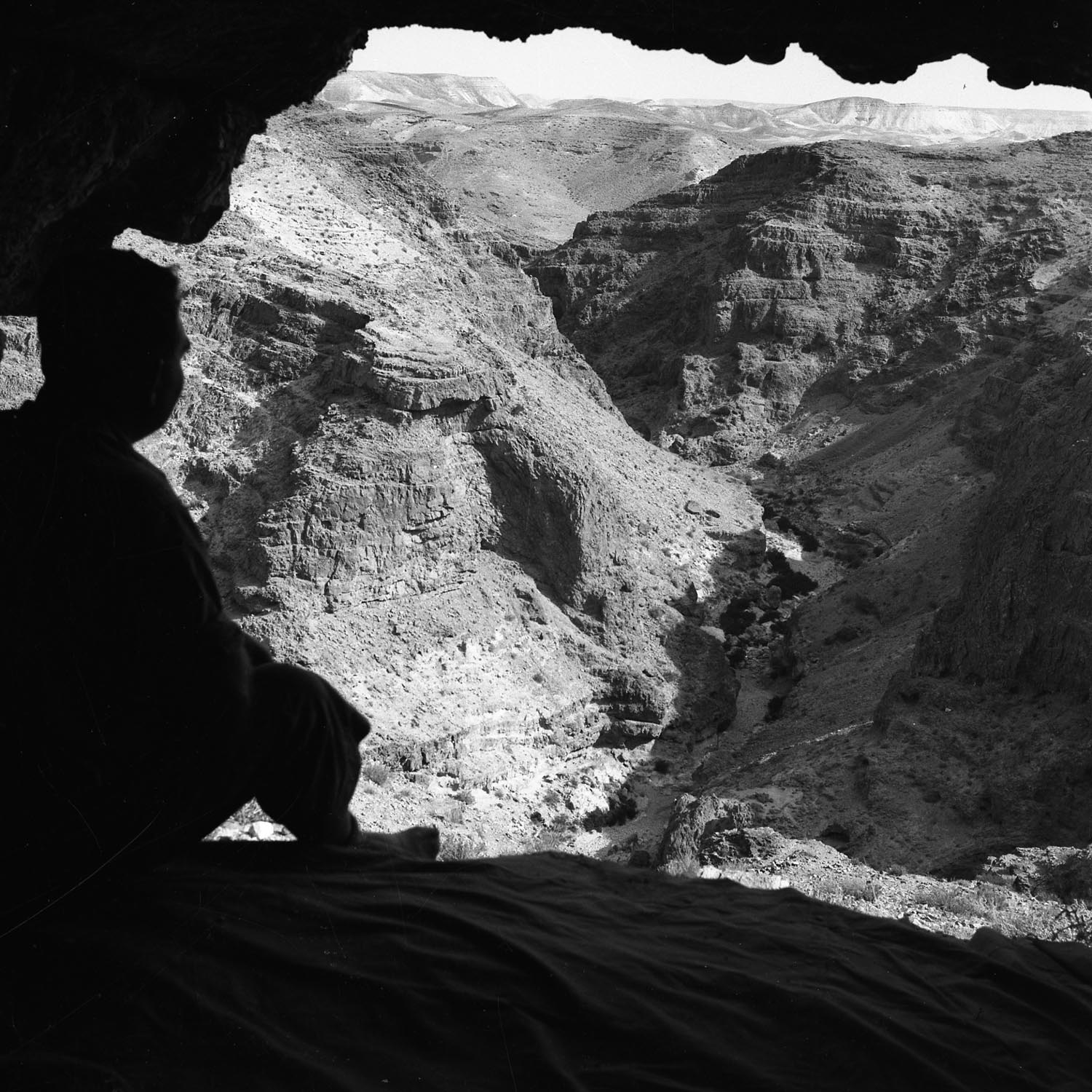 מערת האיגרות הוא שמה של מערה בנחל חבר שבמדבר יהודה, שבה התגלו ממצאים חשובים מימי מרד בר כוכבא ובהם איגרות שכתב בר כוכבא לאנשי עין גדי. מבט מאחד מפתחי המערה לנחל חבר